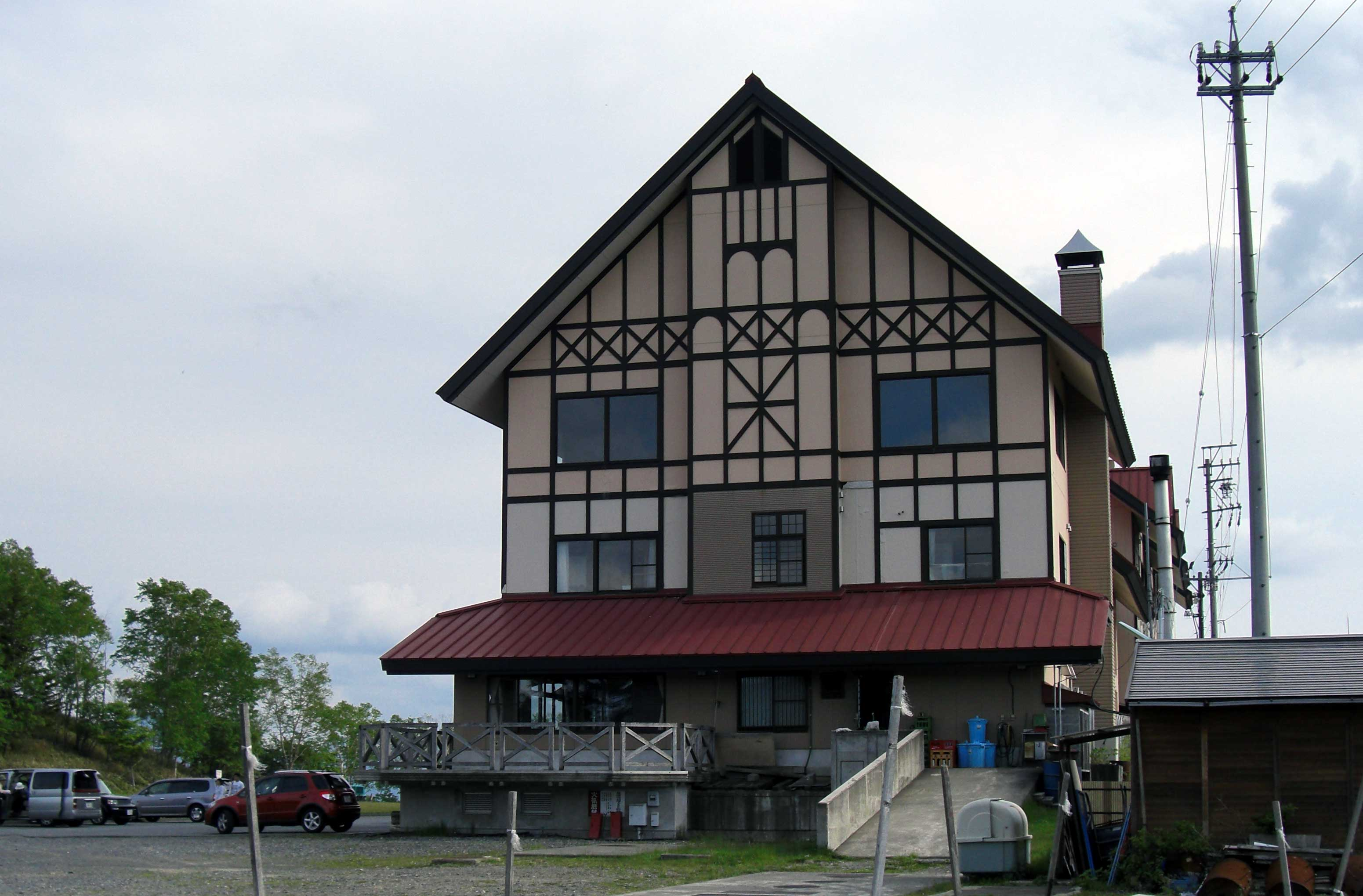 ハイランドしらびその北側からの撮影